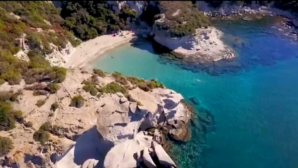 Cala Cumpoltitu, Bosa (Sardegna)